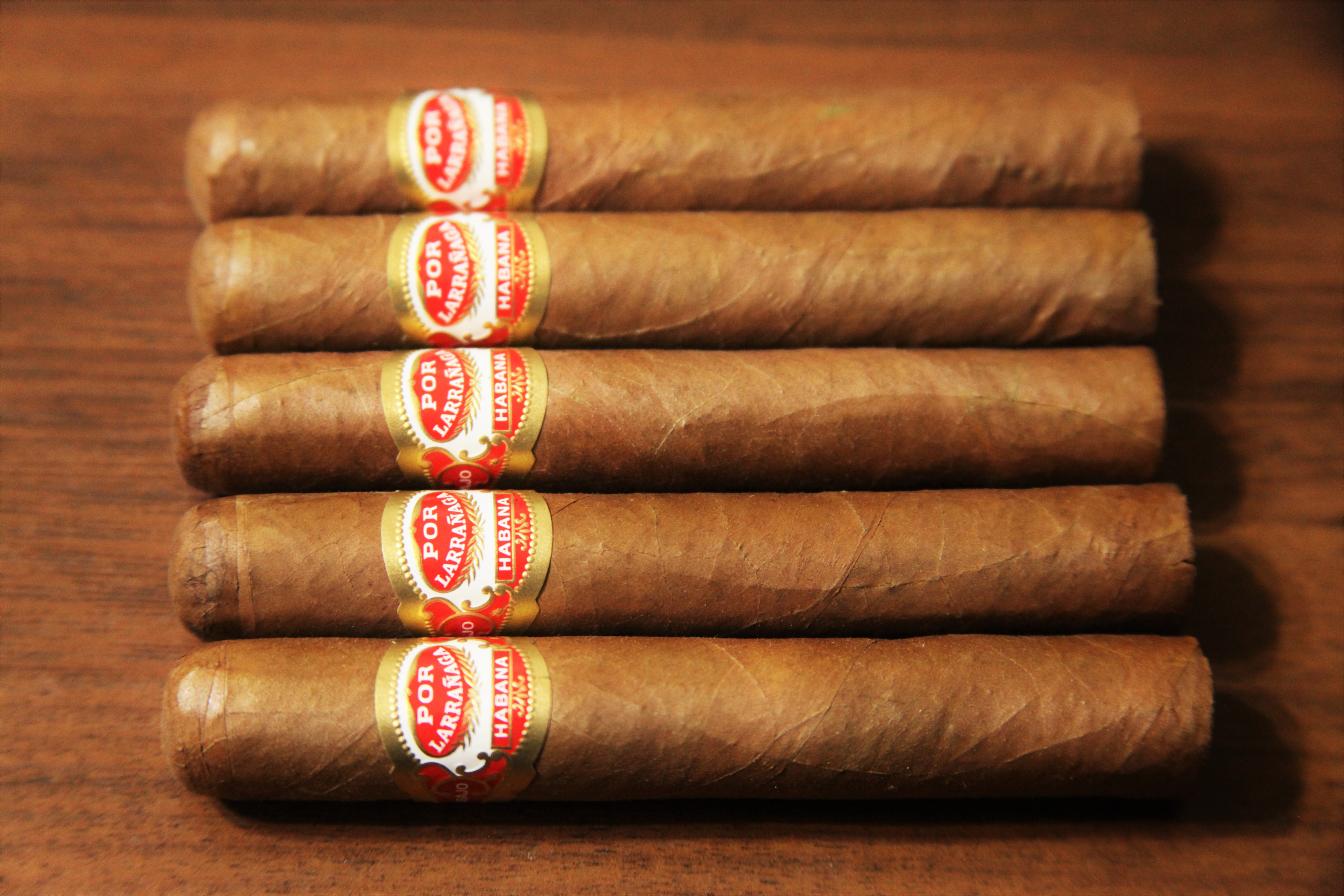 POR LARRANAGA